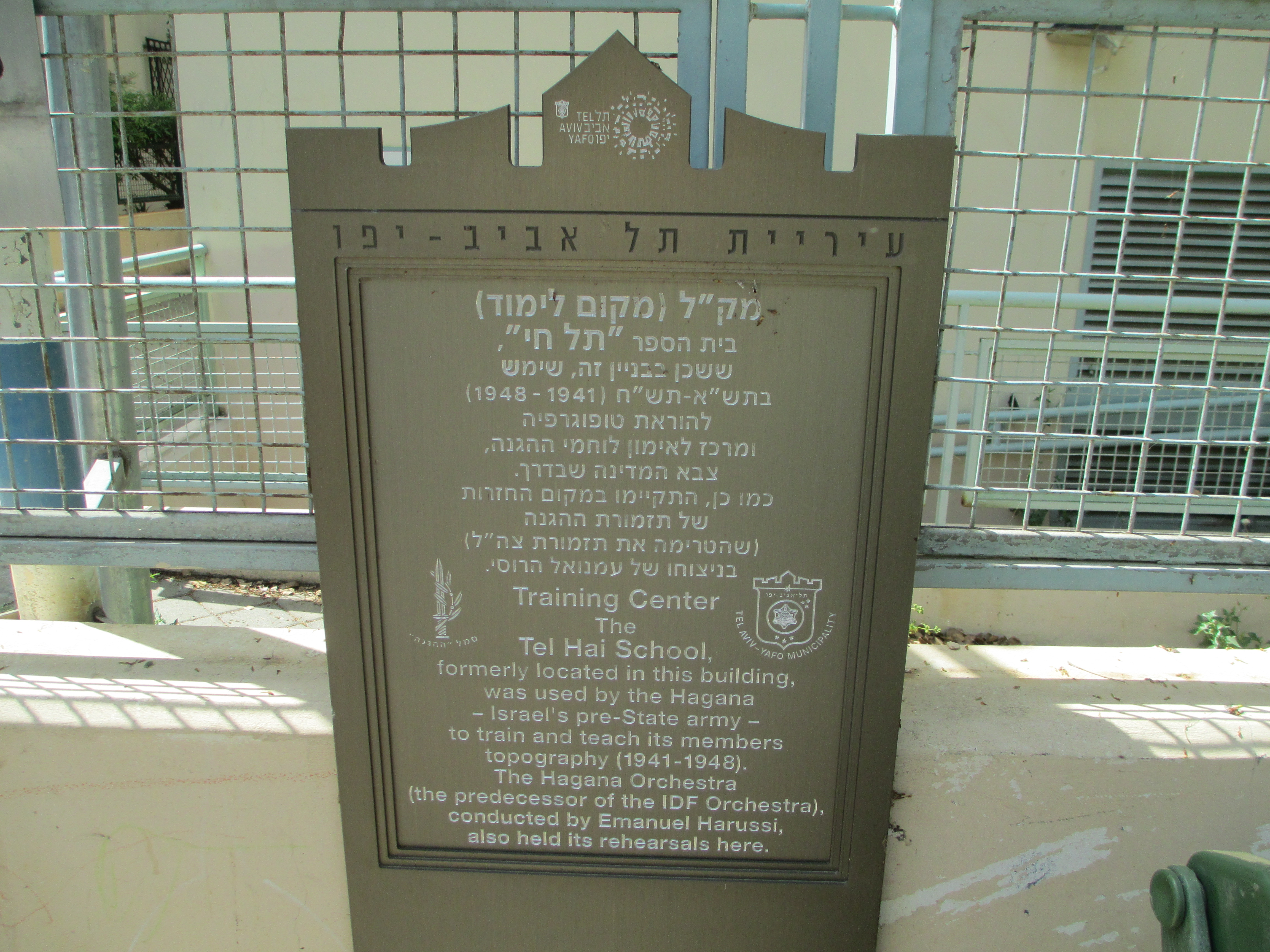 לוחית זיכרון של ההגנה ברחוב זמנהוף 12 בתל אביב